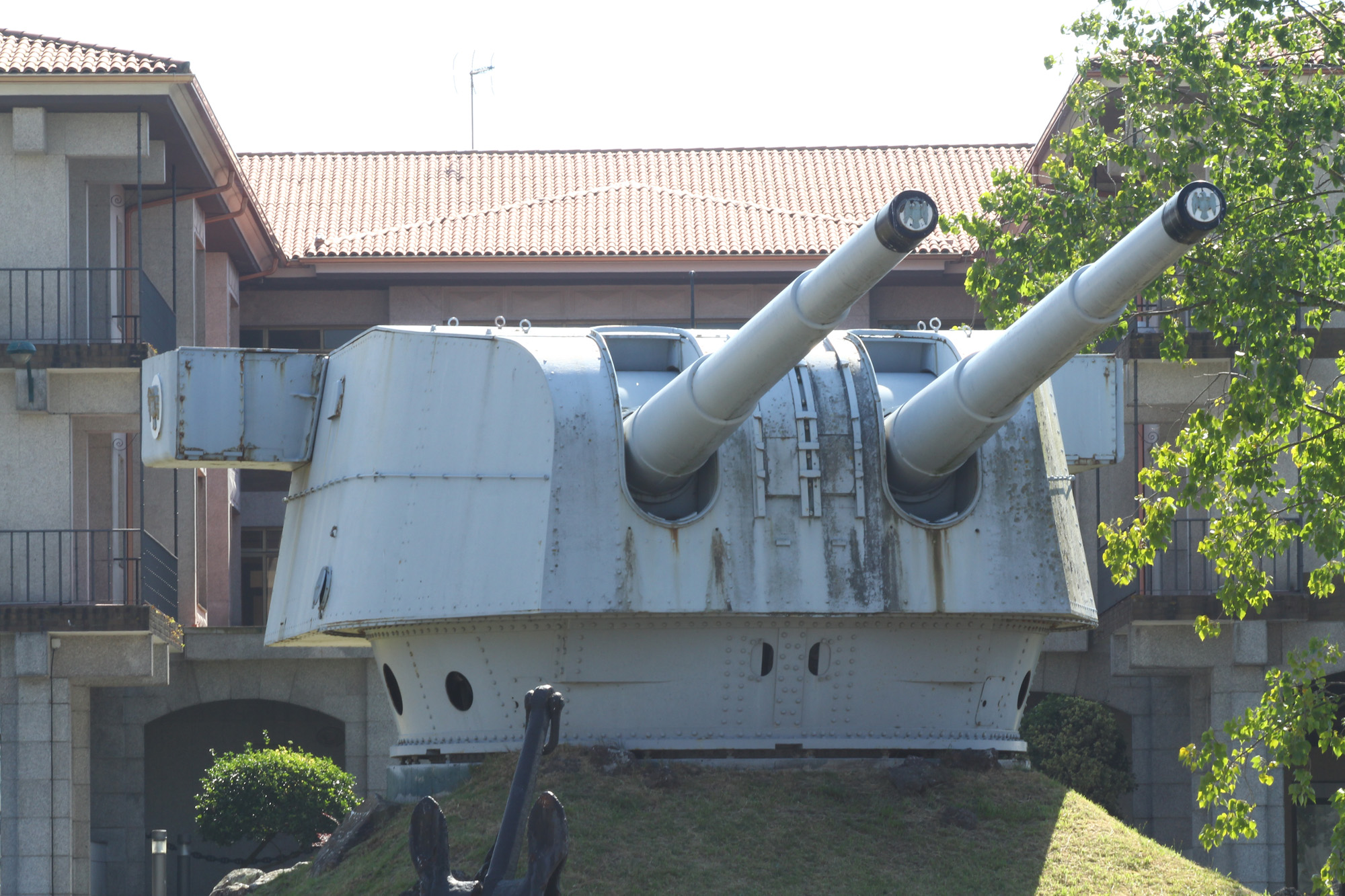 Visita a la Escuela Naval Militar de Marín. Julio de 2014